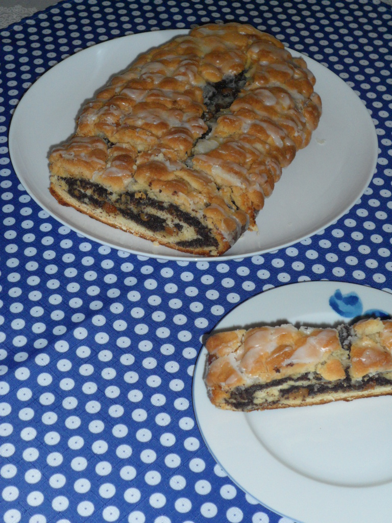 Schläsch: Schläscher Mohstriezel